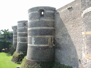 Description: Angers, Château du Roi René. Mai 2003 Auteur: H.Lefebvre Licence